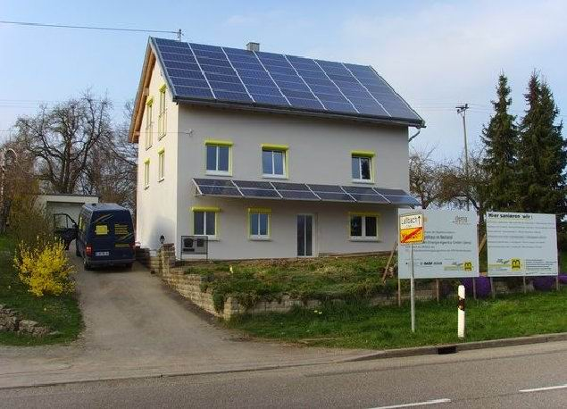 Solarhaus Hedwig in Mäusdorf